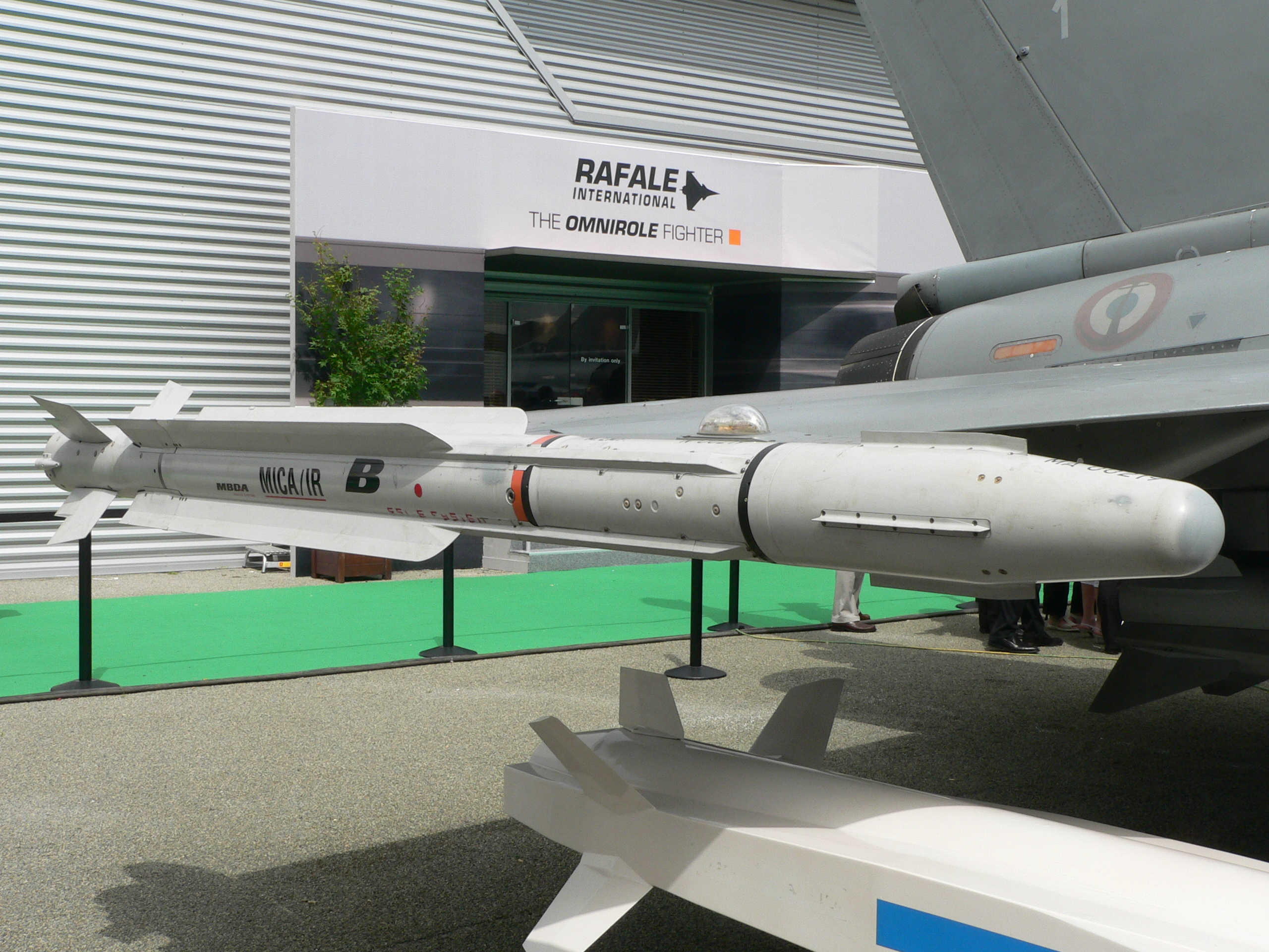 MBDA MICA on a Dassault Rafale Marine